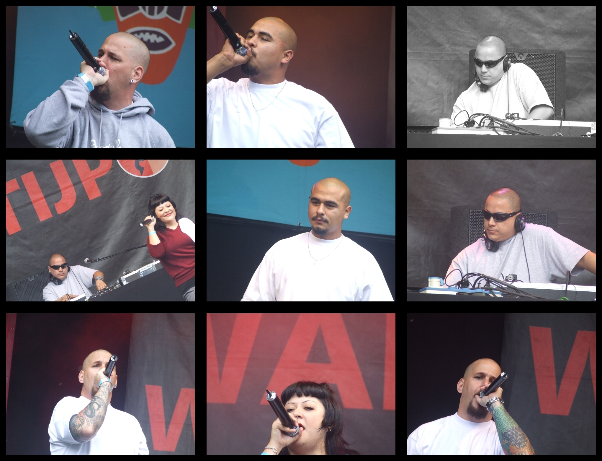 Deze foto maakte ik op Wantijpop 2007 in Dordrecht. Dit zijn de Delinquent Habits, een hiphopgroep uit de VS.